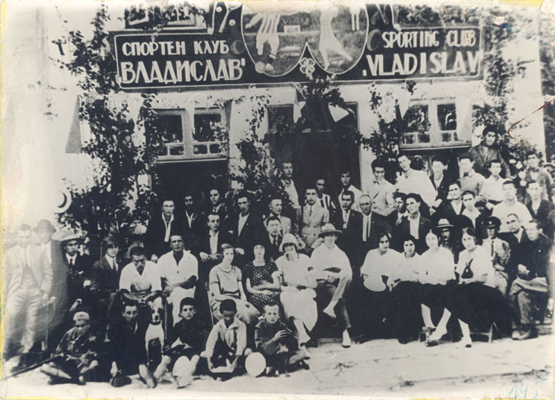 Спортен клуб Владислав. Групов портрет на спортистите и членовете пред сградата на клуба, основан на 1 май 1921 г.